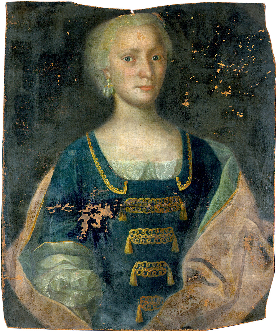 Bildnis der Charlotte Johanna von Holleufer, geb. von Krosigk (1738-1784) im blauen Kleid mit Goldstickerei. Öl auf Leinwand. 68,2 x 57 cm. Bezeichnet "Wahrscheinlich eine Zwillingstochter von ... Krosigk Charlotte Johanna geb. ... vermählt mit dem Oberstleutnant von Holleufer aus Obernitzschka". Provenienz: Schloss Poplitz in Sachsen-Anhalt; deutscher Adelsbesitz.